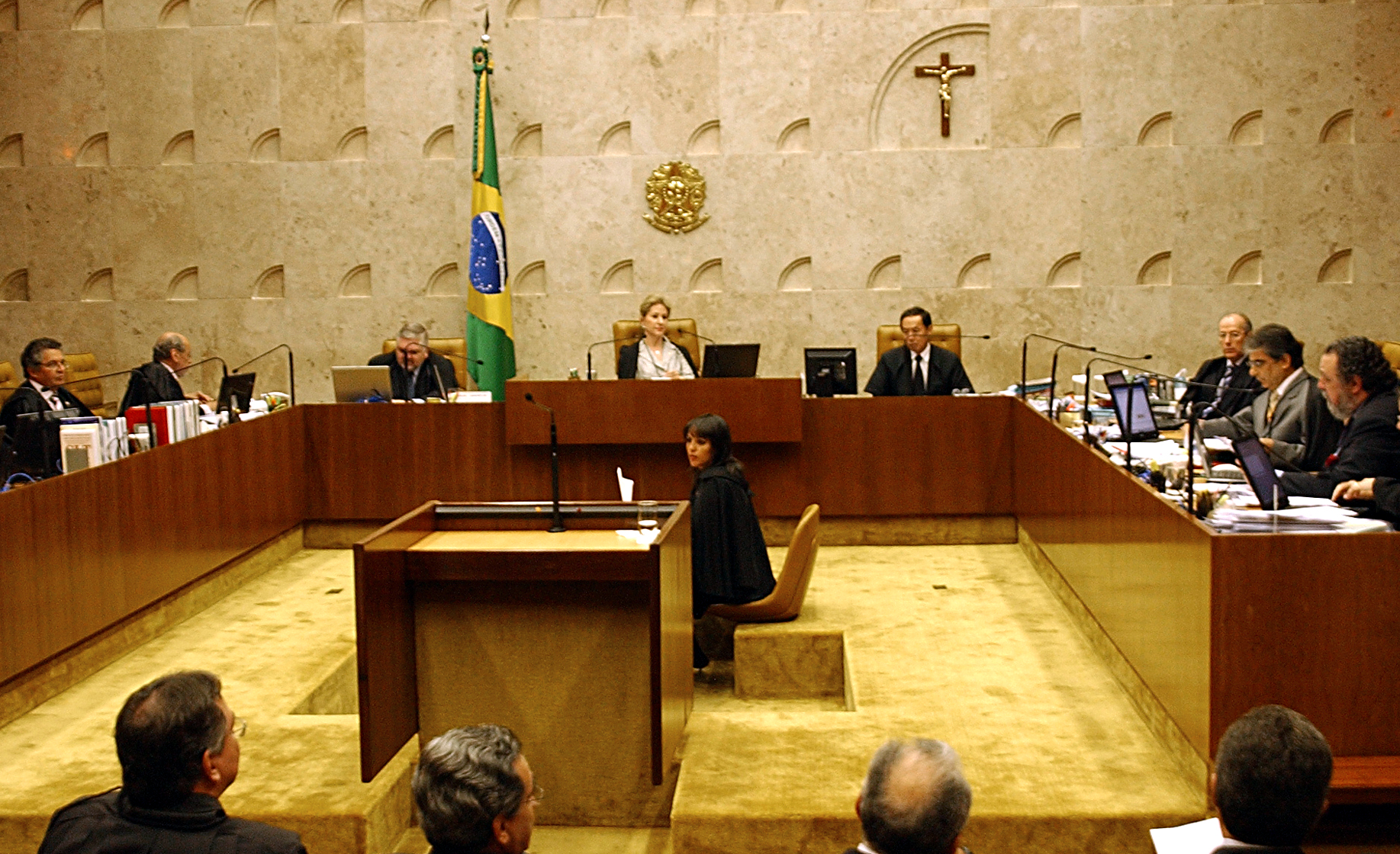 O Supremo Tribunal Federal (STF) na sessão que derrubou, por maioria de votos, a cláusula de barreira. Dos 11 ministros, seis consideraram inconstitucional a norma prevista no artigo 13 da Lei dos Partidos, que limitava a atuação das legendas que não obtiveram o patamar de votação exigido.